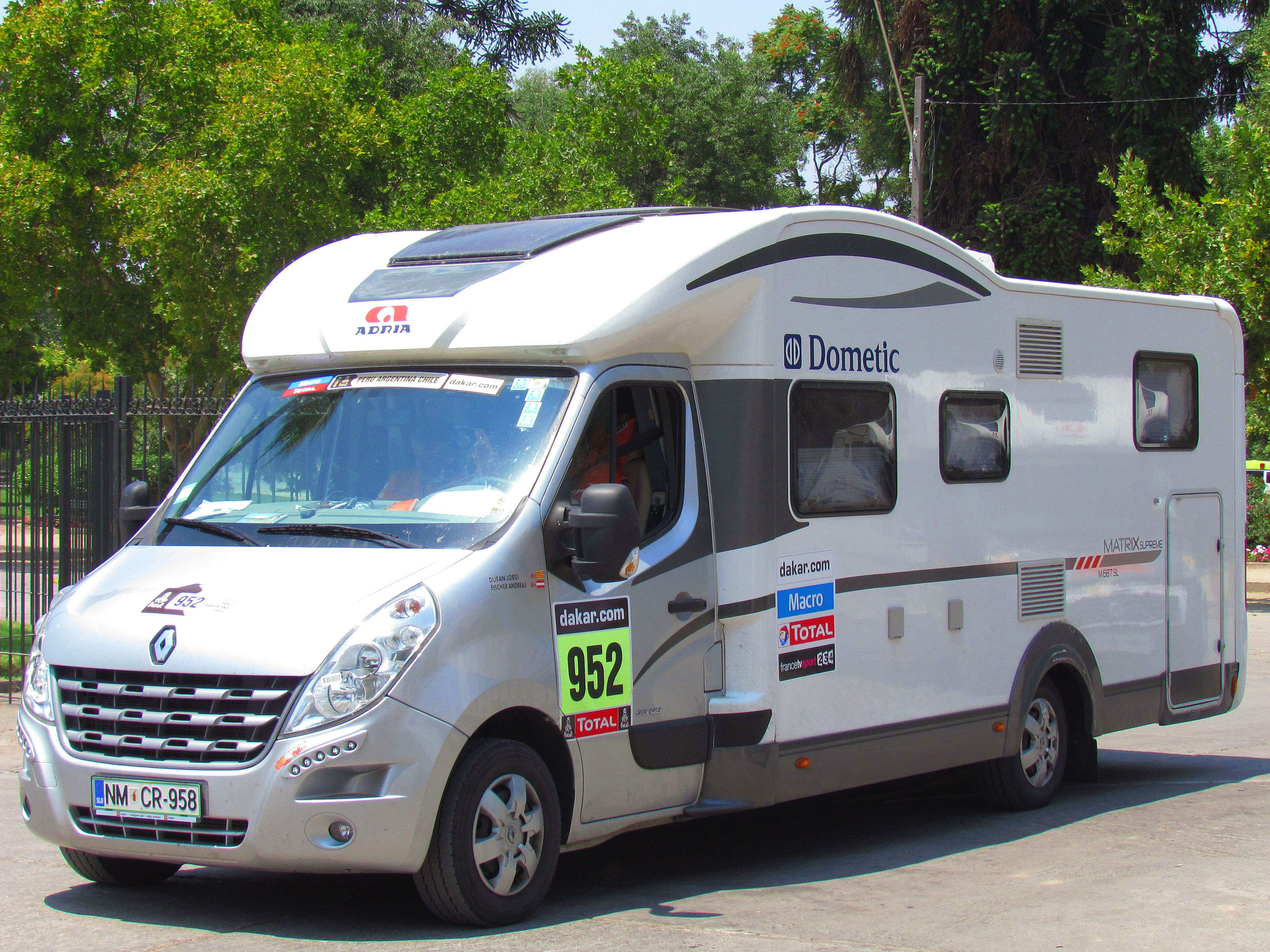 Renault Master dCi 125 Matrix Supreme